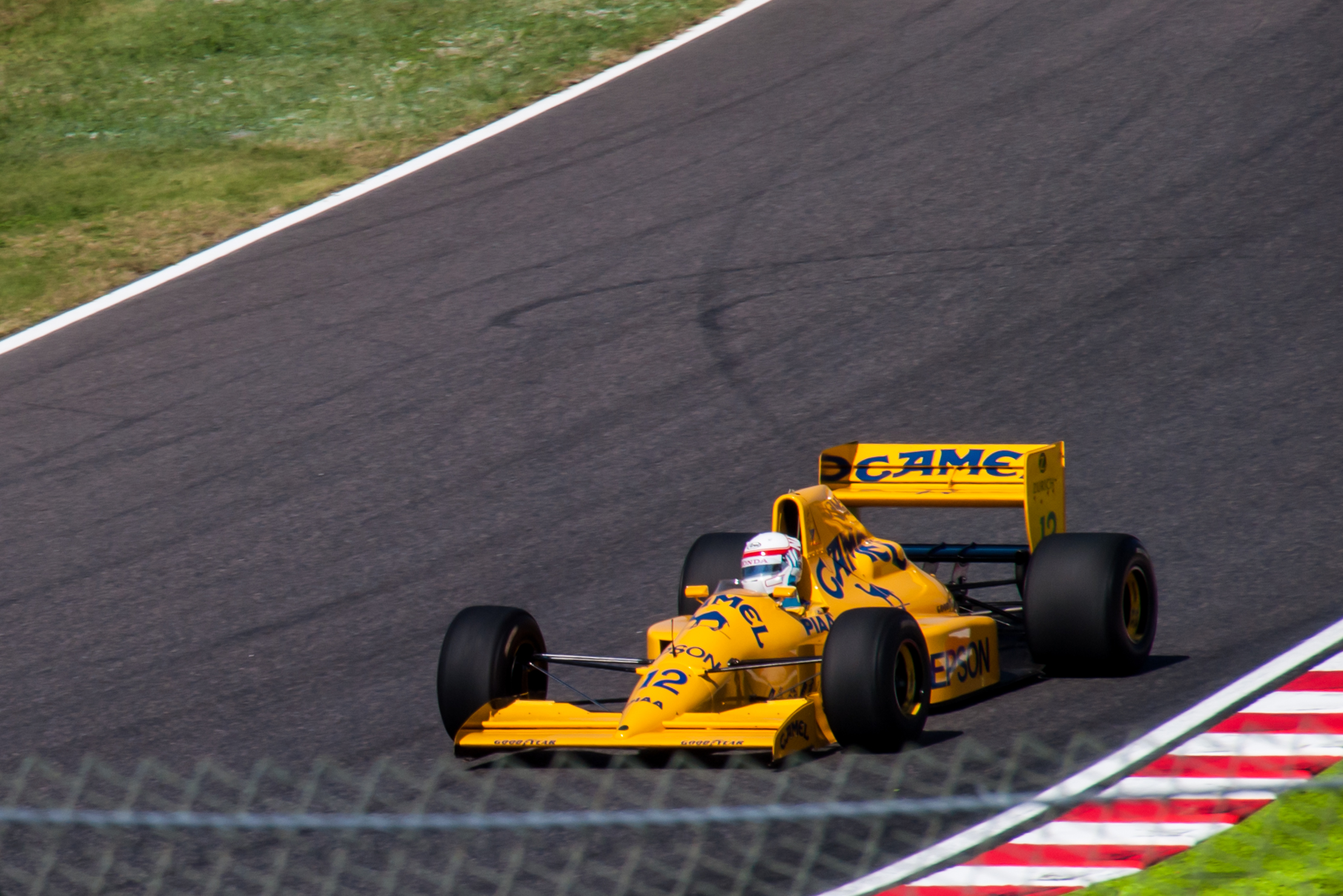 La Lotus 101, pilotée par Satoru Nakajima, en marge du Grand Prix du Japon 2012